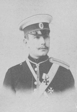 Павел Александрович Демидов, офицер Кавалергардского полка, волынский губернский предводитель дворянства.